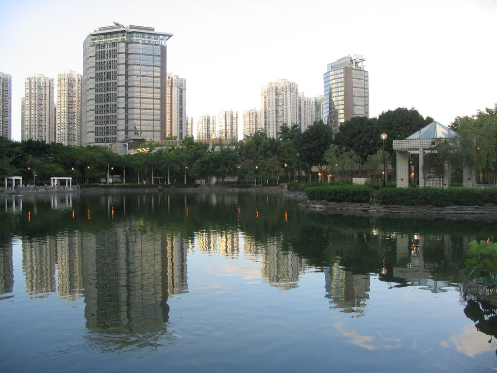 天水圍公園 Tin Shui Wai Park